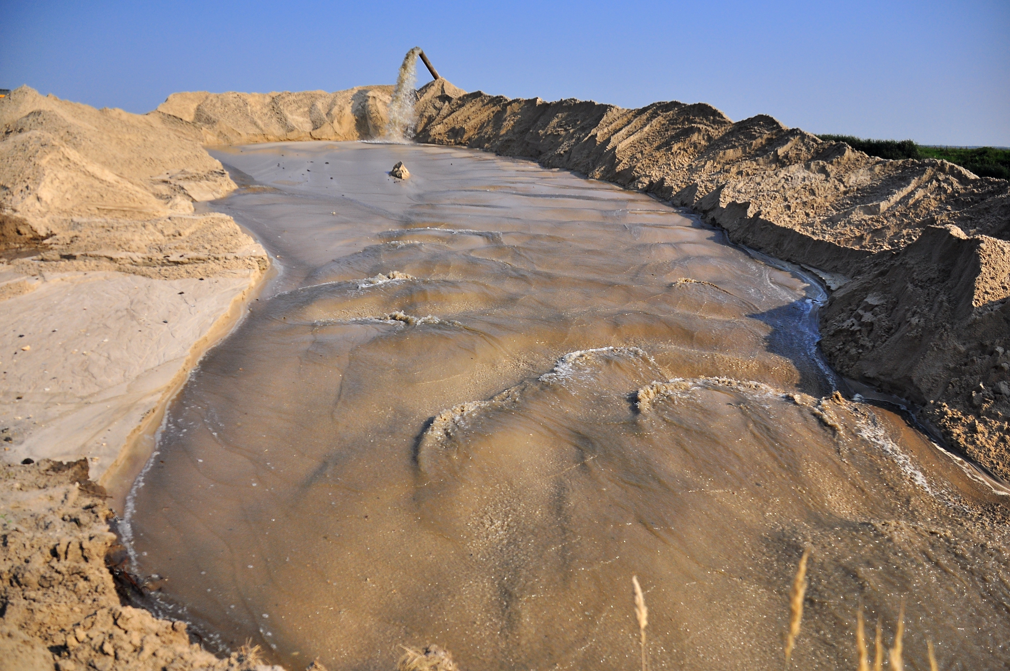 Добыча песка в Волгоградской области